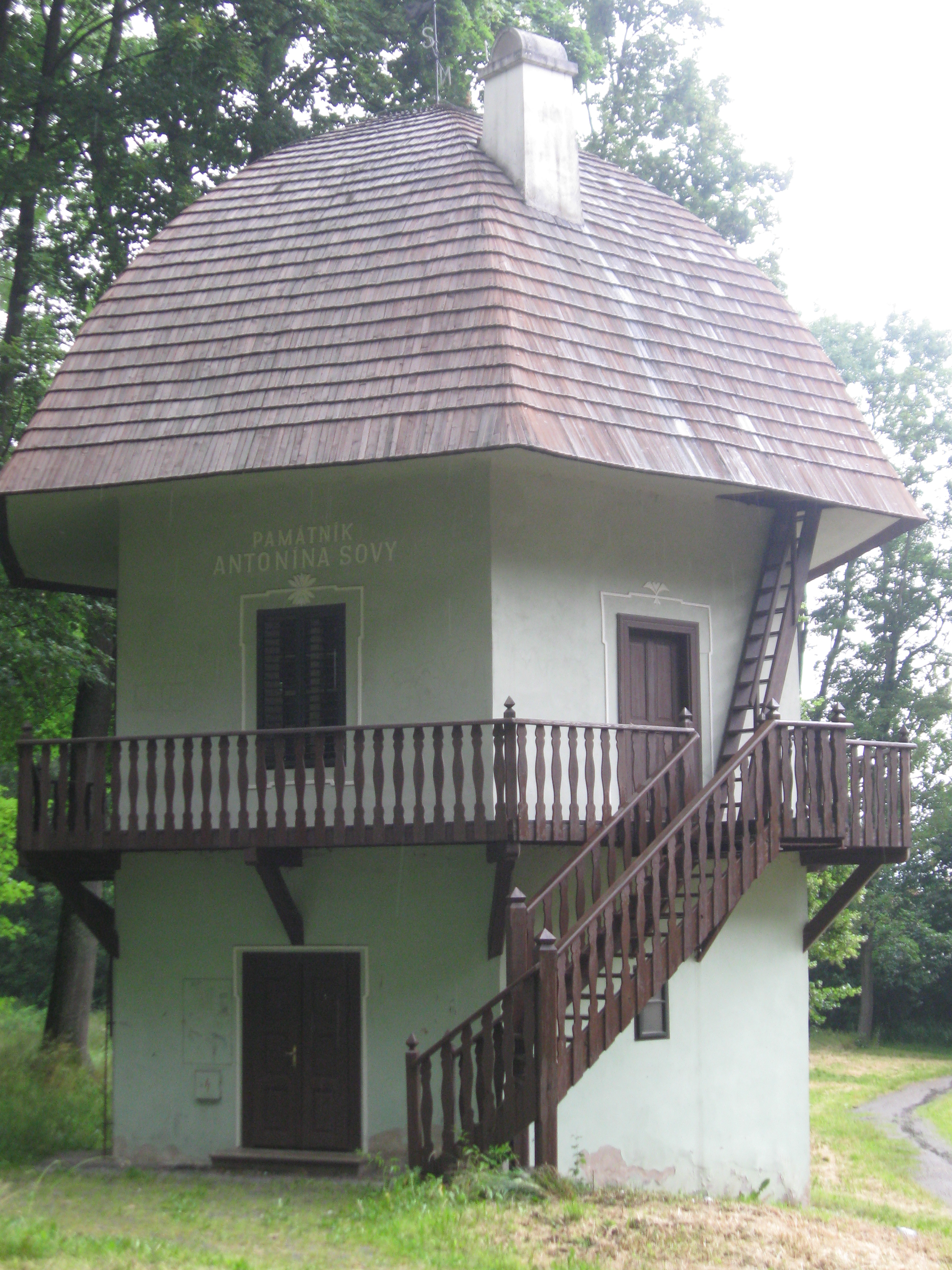 klasicistní pavilon Hříbek v zámecké zahradě, památník Antonína Sovy, Lukavec, okres Pelhřimov